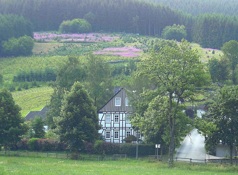 Oberhenneborn (Schmallenberg), Germany.